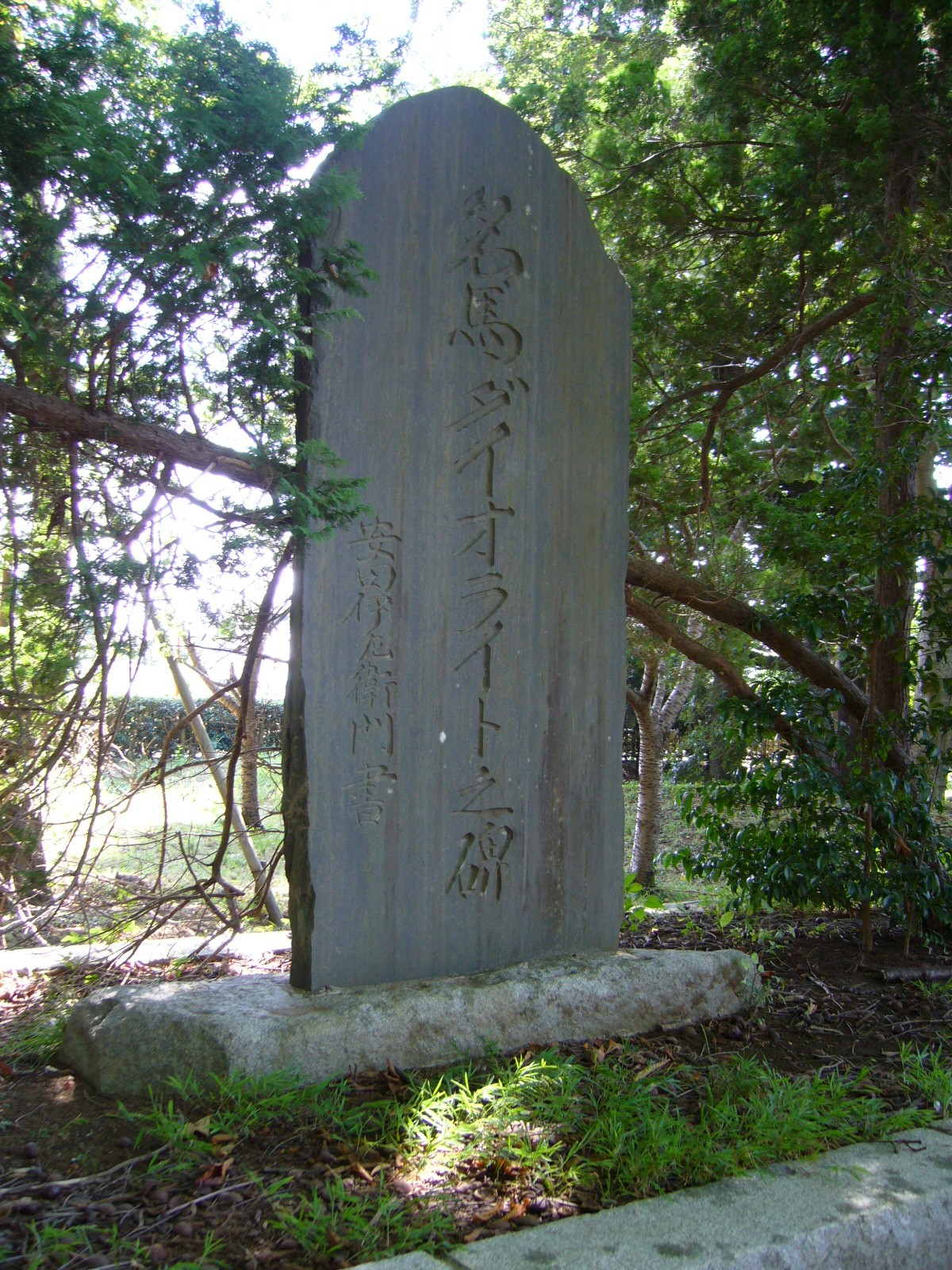 Monument-japanese-racehorse-"Diolite",narita-city,japan